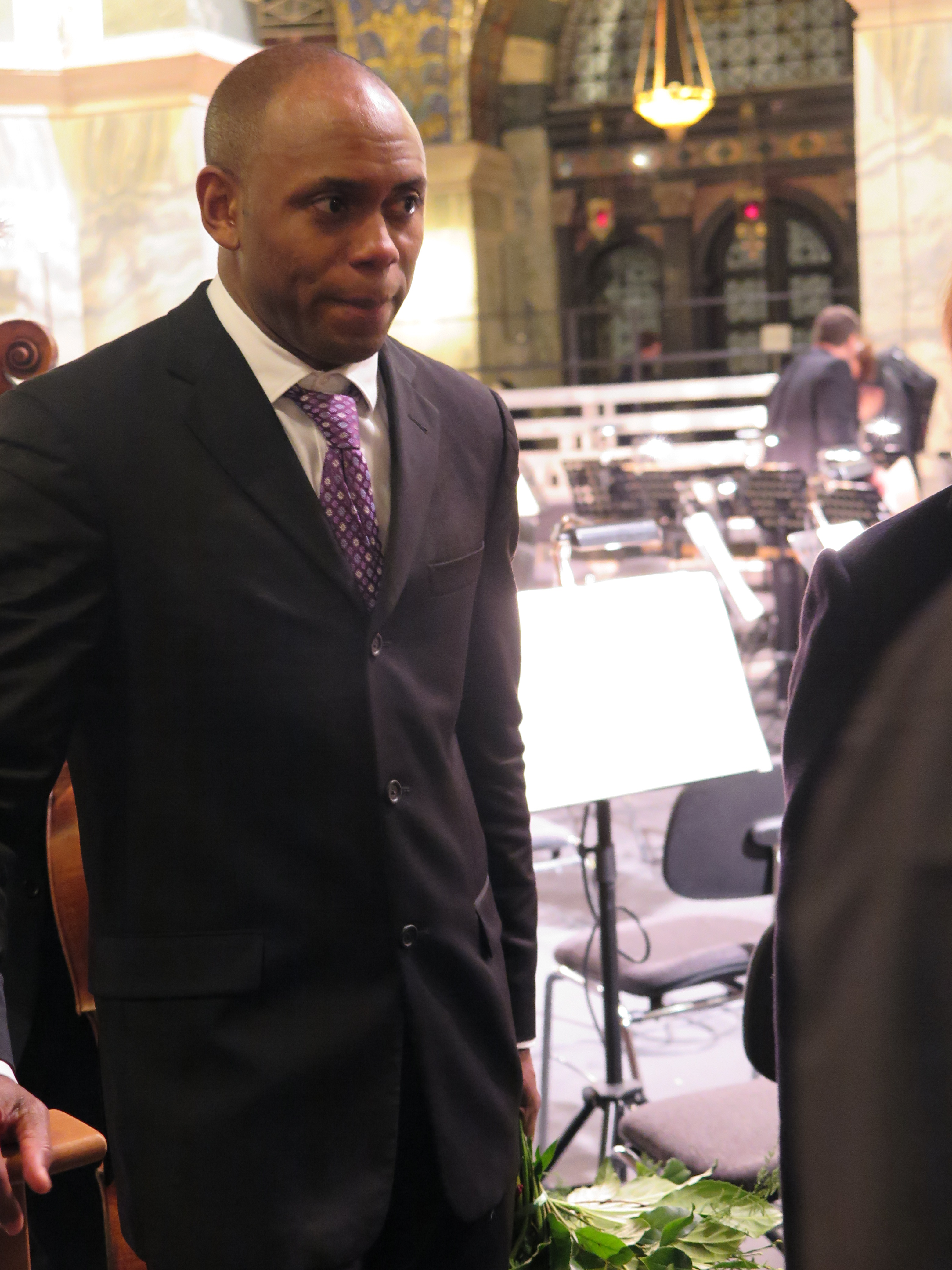 Kazem Abdullah, Generalmusikdirektor der Stadt Aachen, nach der Aufführung des Oratoriums Elias von Felix Mendelssohn Bartholdy im Aachener Dom am 17. April 2015.